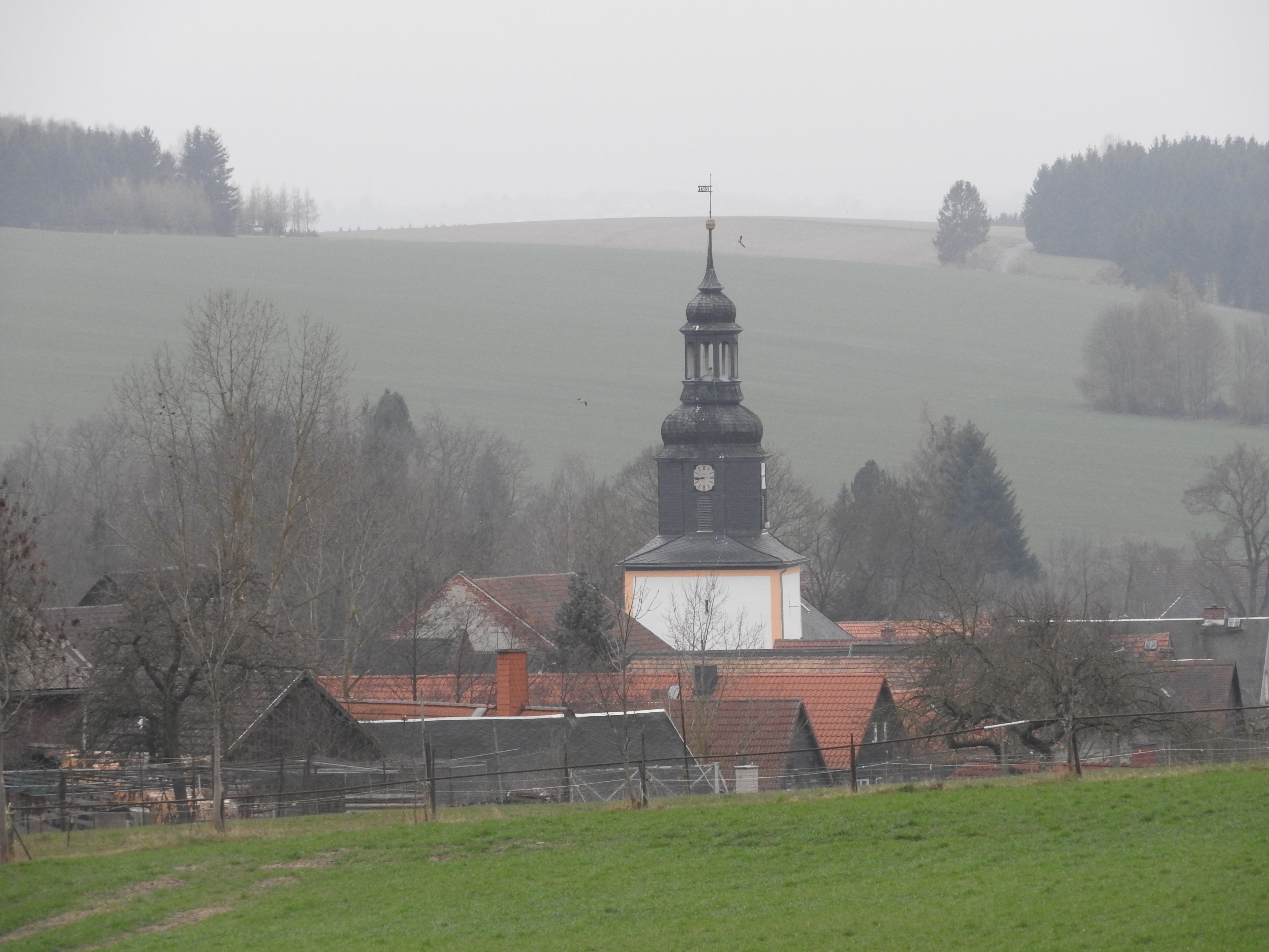 Volkmannsdorf in Thüringen